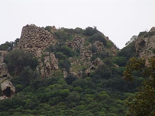 Nuraghe Antigori presso Sarroch (CA)